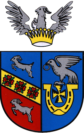 Herb wsi Miasteczko Krajeńskie